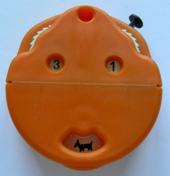 Manueller Stueckzaehler